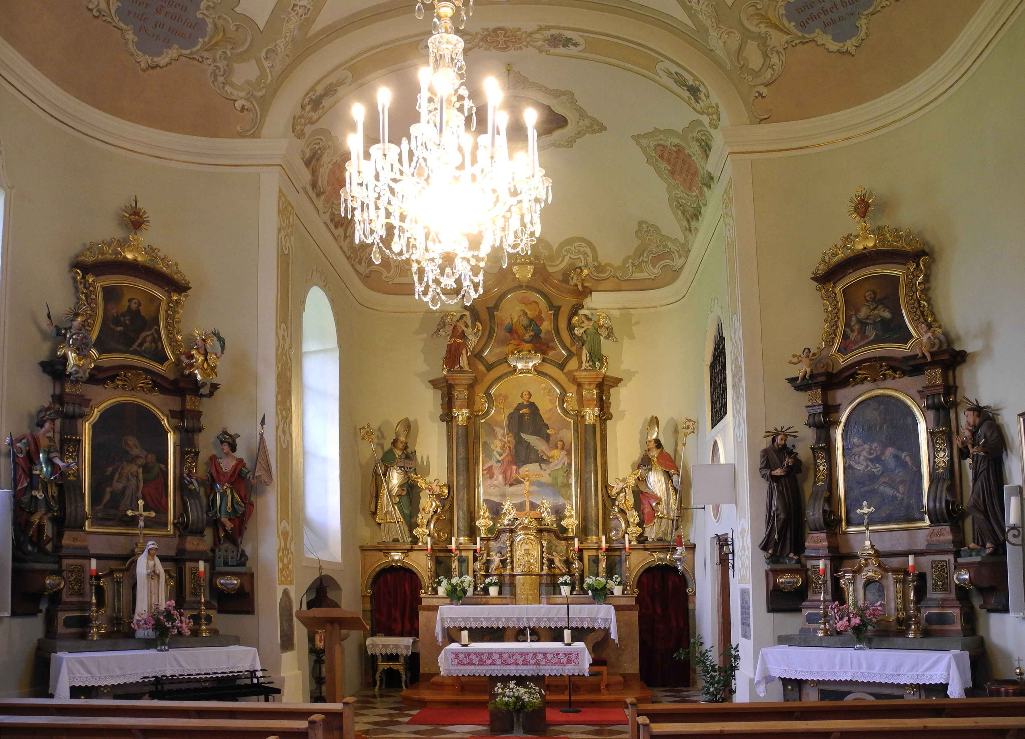 Altarraum der Pfarrkirche des hl. Leonhard in Forstau